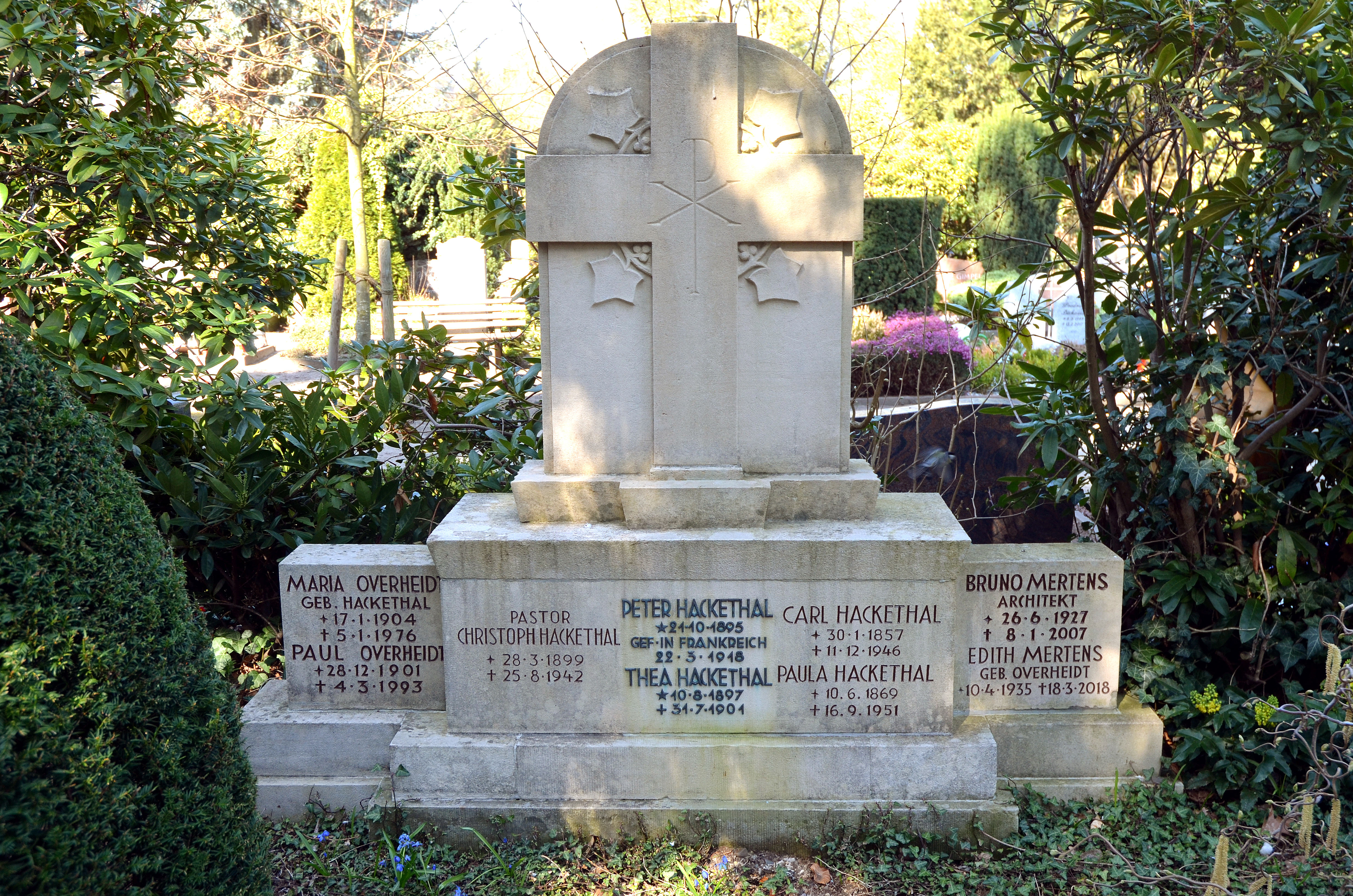 Familiengrabmal auf dem Neuen St.-Nikolai-Friedhof in Hannover. Ausgehend von Inschriften der Ältesten ergibt sich folgende Reihenfolge: Die Eltern: Carl Hackethal, geboren 30. Januar 1857; gestorben 11. Dezember 1946 Paula Hackethal, geboren 10. Juni 1869; gestorben 16. September 1951 Deren Kinder: Peter Hackethal, geboren 21. Oktober 1895, gefallen 22. März 1918 in Frankreich Thea Hackethal, geboren 10. August 1897, gestorben 31. Juli 1901 Pastor Christoph Hackethal, geboren 28. März 1899, gestorben 25. August 1942 im KZ Dachau Paul Overheidt, geboren 28. Dezember 1901; gestorben 4. März 1993 Maria Overheidt, geborene Hackthal, geboren 17. Januar 1904; gestorben 5. Januar 1976 Bruno Mertens, Architekt, geboren 26. Juni; gestorben 8. Januar 2007 Edith Mertens, geborene Overheidt, geboren 10. April 1935; gestorben 18. März 2018